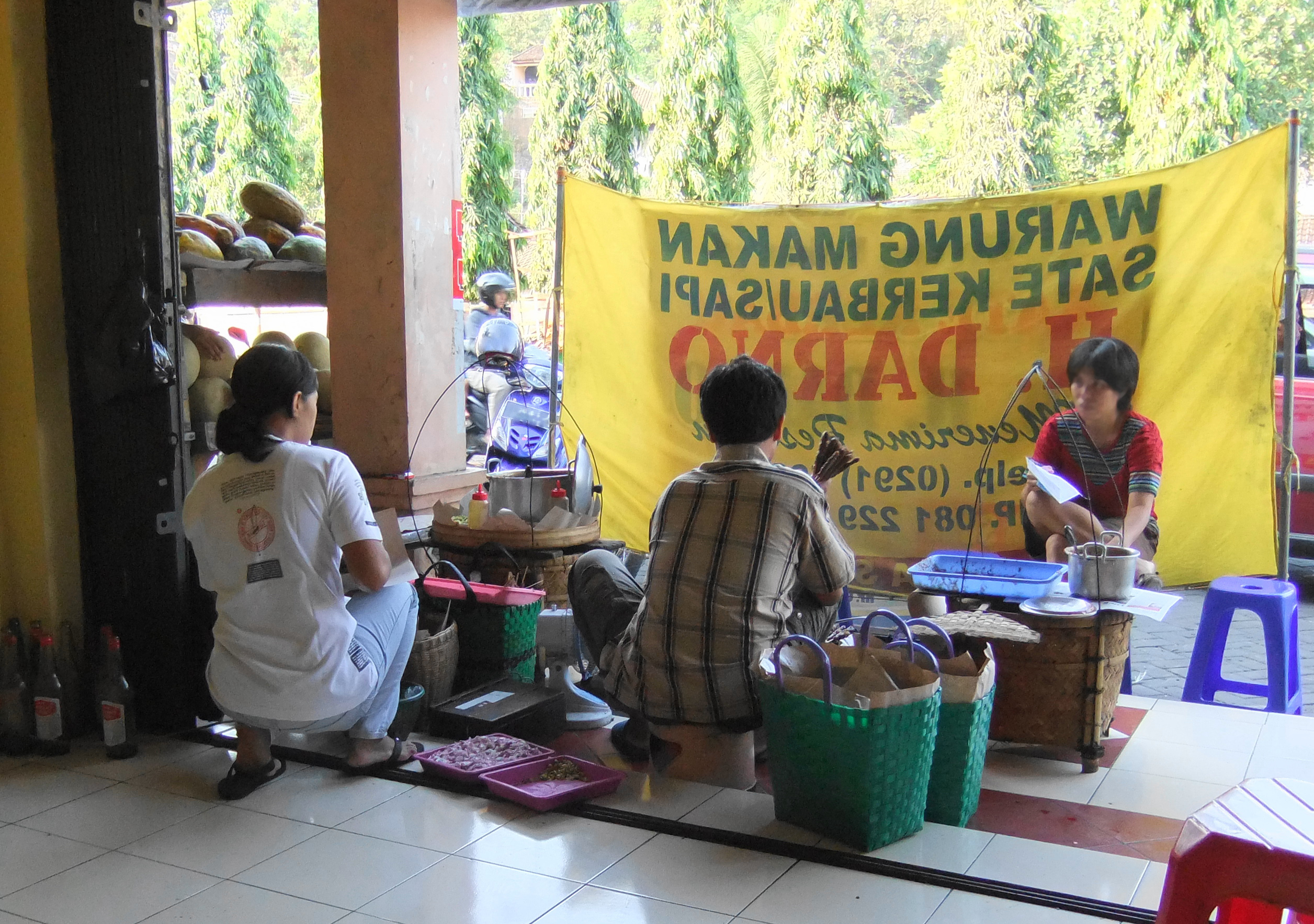 Warung makan sate kerbau/sapi Jepara